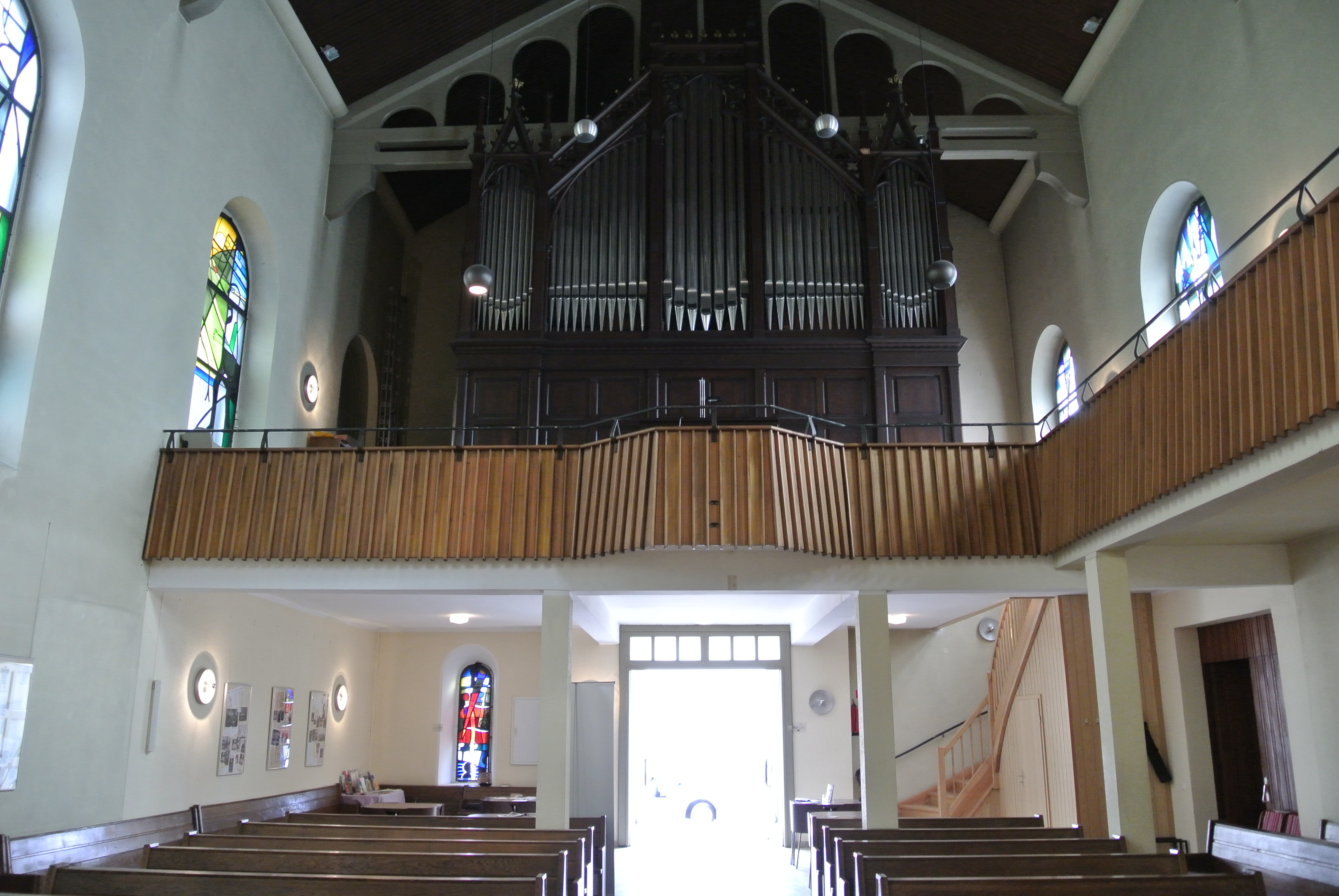 Evangelische Segenskirche in Frankfurt-Griesheim, Alte Falterstraße 6, neoromanische Hallenkirche von Heinrich Burnitz, 1865, Baudenkmal, Innenraum mit Orgelempore